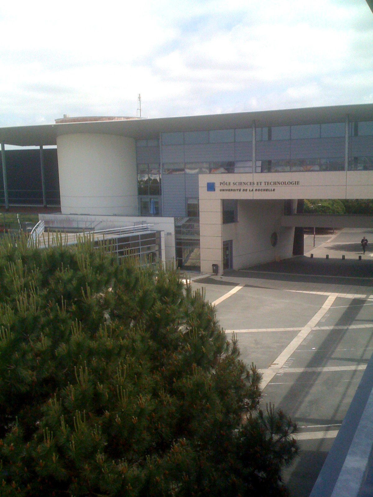 Pôle Sciences et Technologie de l'Université de La Rochelle (Charente-Maritime, France).